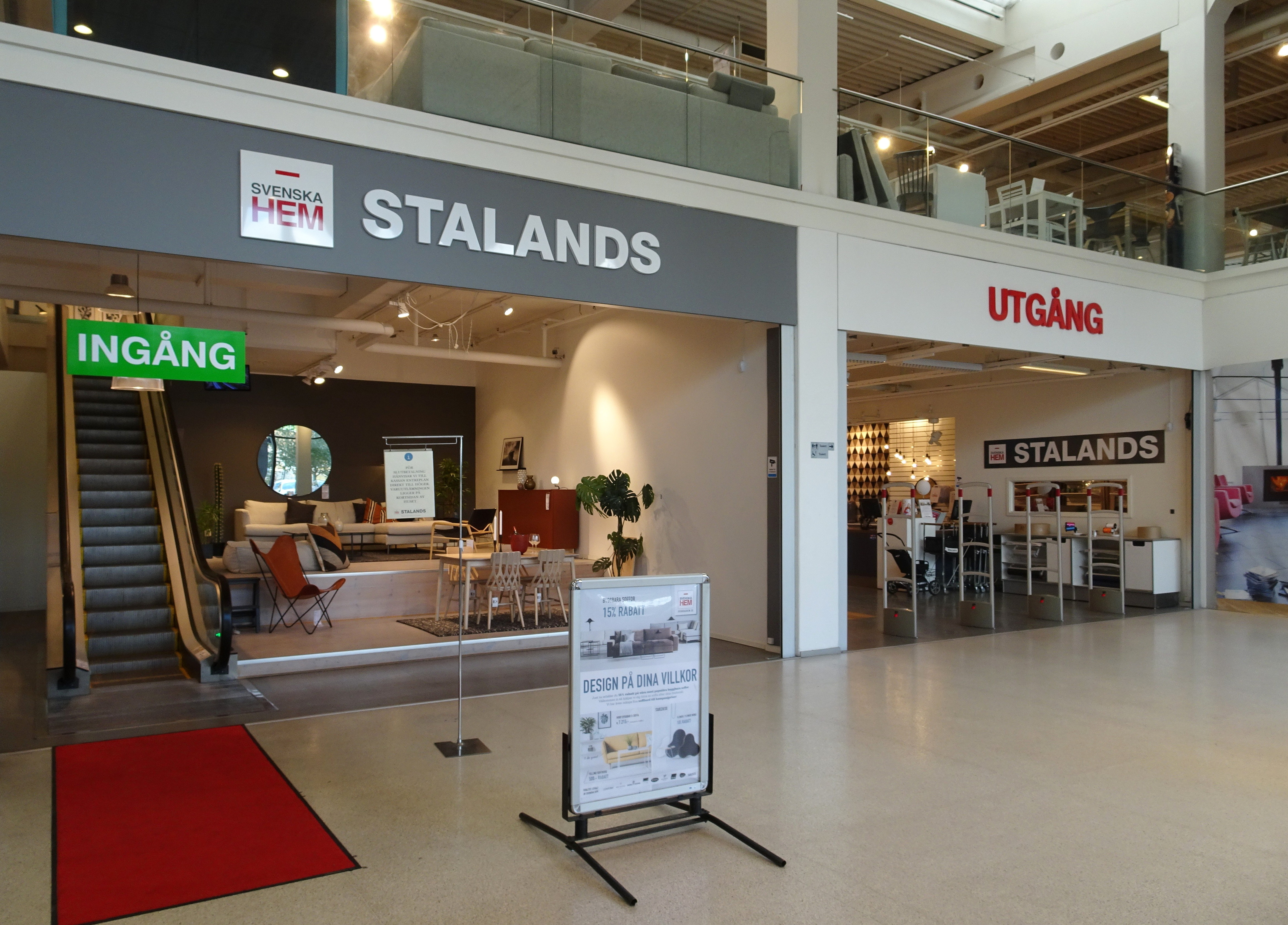 Stalands Kungens kurva